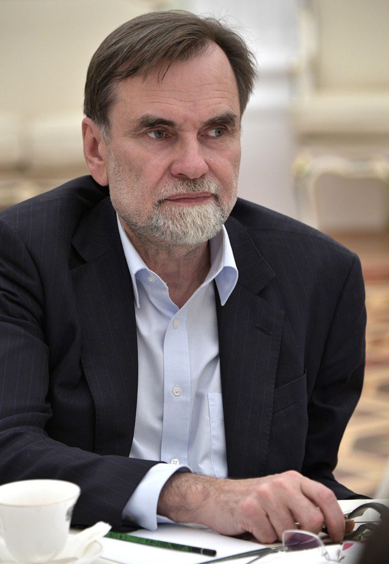 Соучредитель студии анимационного кино «Мельница», руководитель кинокомпании «СТВ» Сергей Сельянов во время встречи с Президентом России Владимиром Путиным